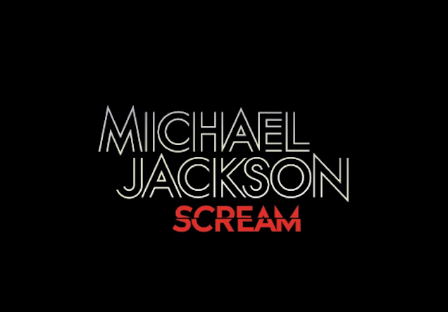 Título del álbum Scream de Michael Jackson